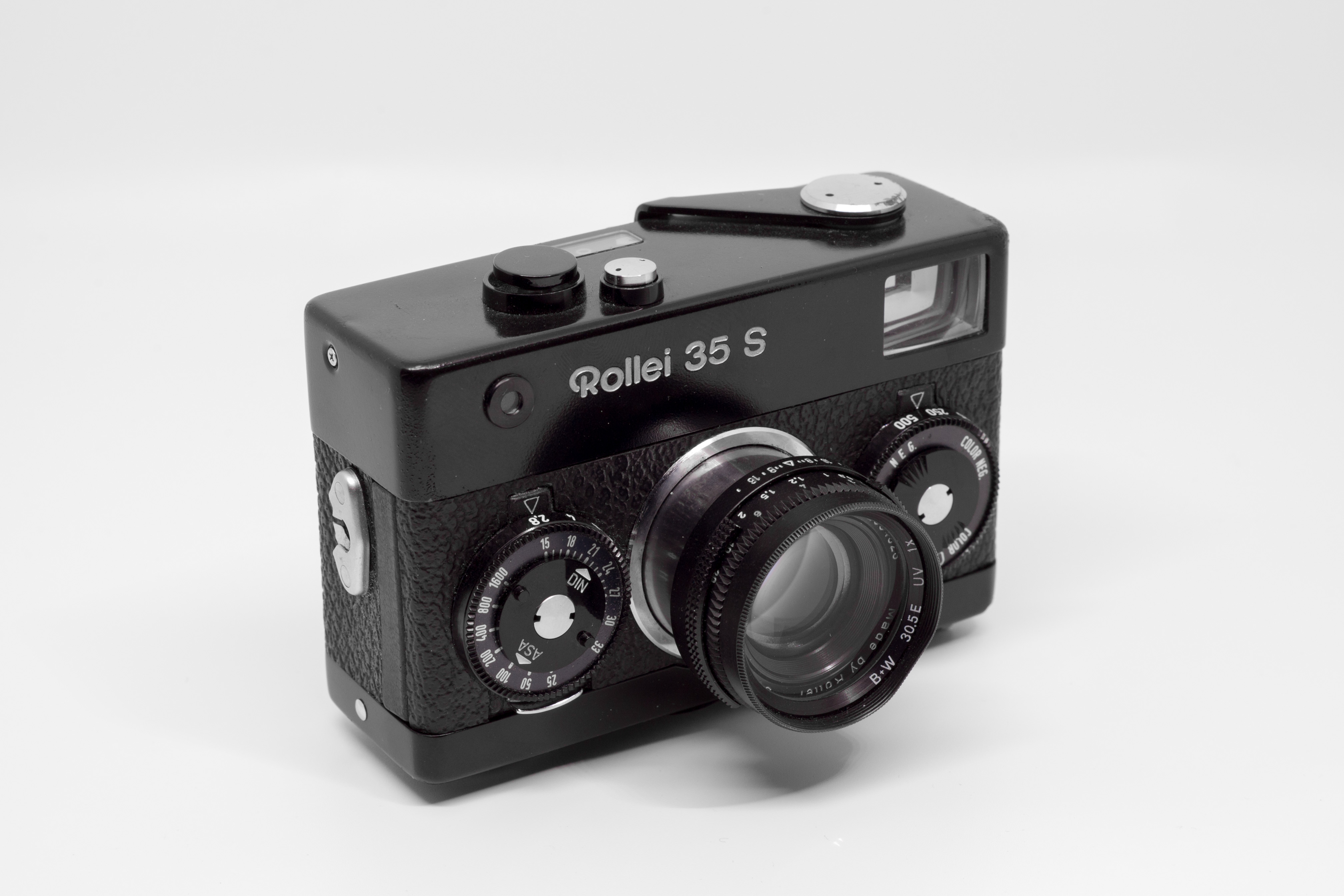 35mm camera Rollei 35 S rangefinder.